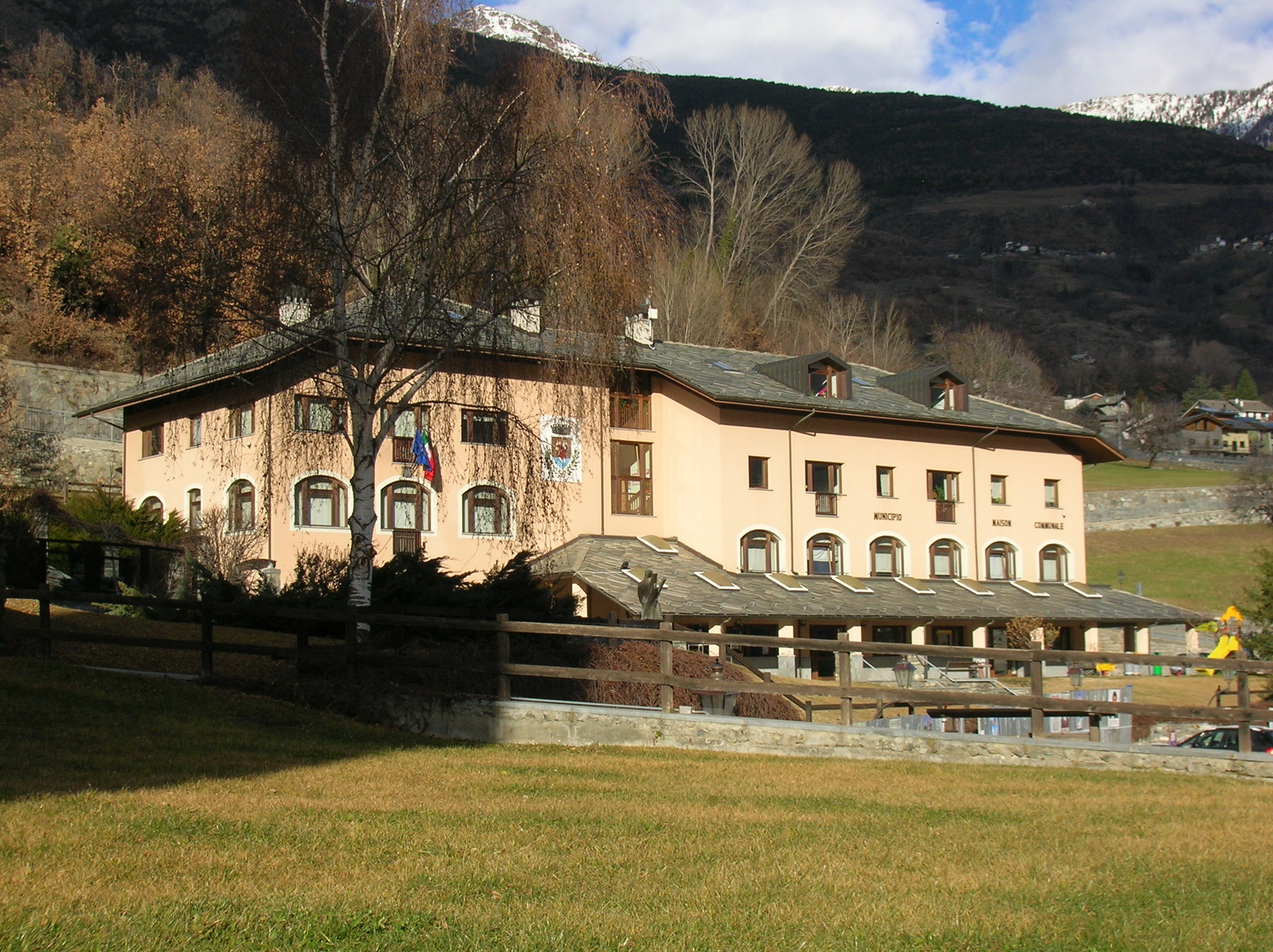 Municipio di Saint-Christophe, Valle d'Aosta, Italia.